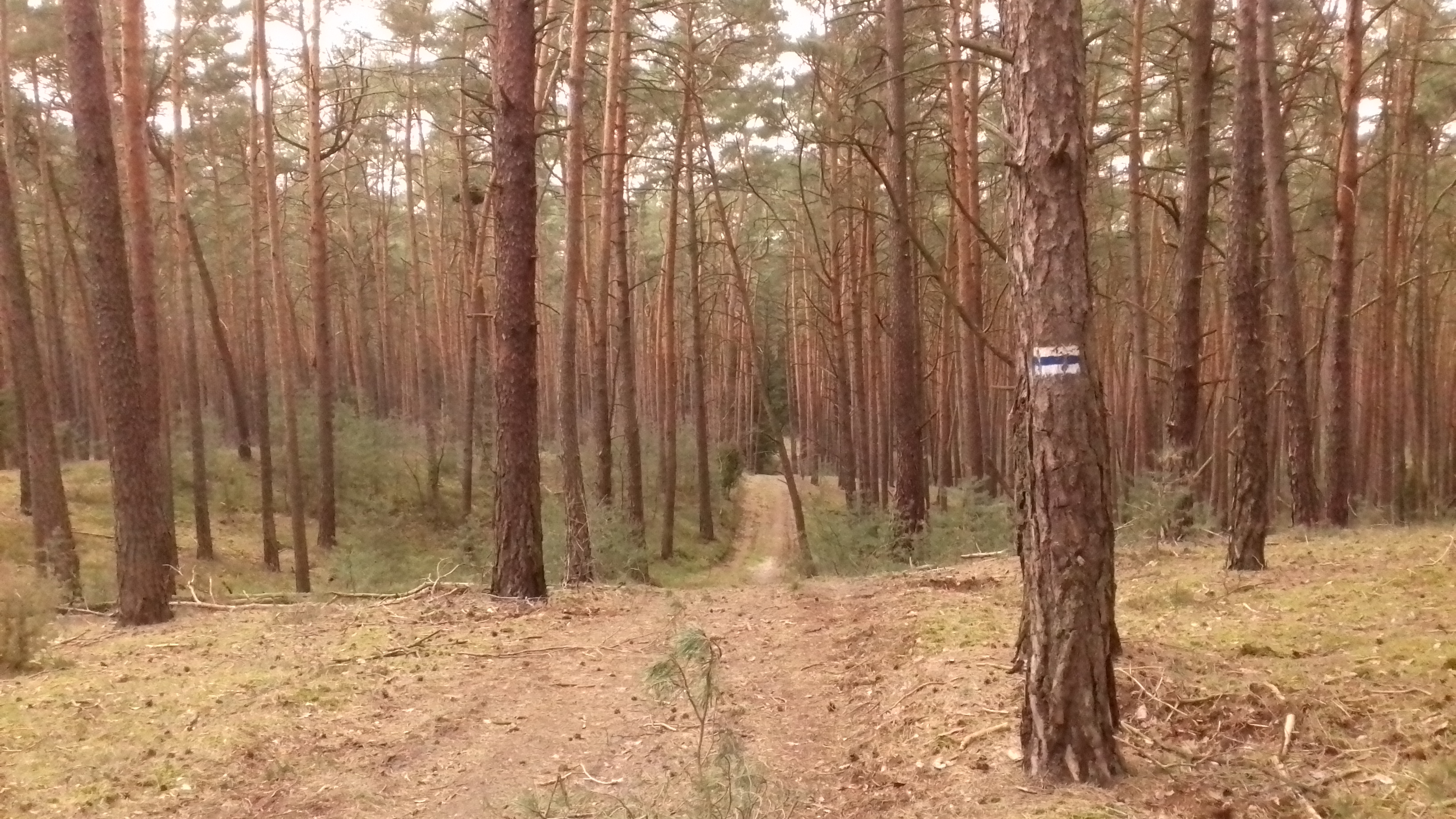 Szlak pieszy nr 3583 - przejście przez wał wydmowy w rejonie Grzybna